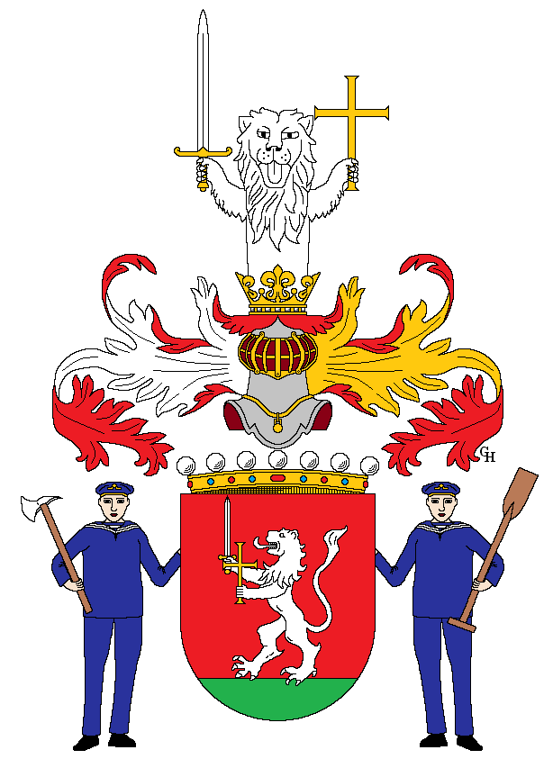 Wappen des österreichisch-ungarischen Vizeadmirals Anton von Petz (1819–1885), verliehen anlässlich seiner Erhebung in den österreichischen Freiherrenstand 1867. Zeichnung von Gerd Hruška ( Für weitere Informationen zu dieser Standeserhebung siehe (